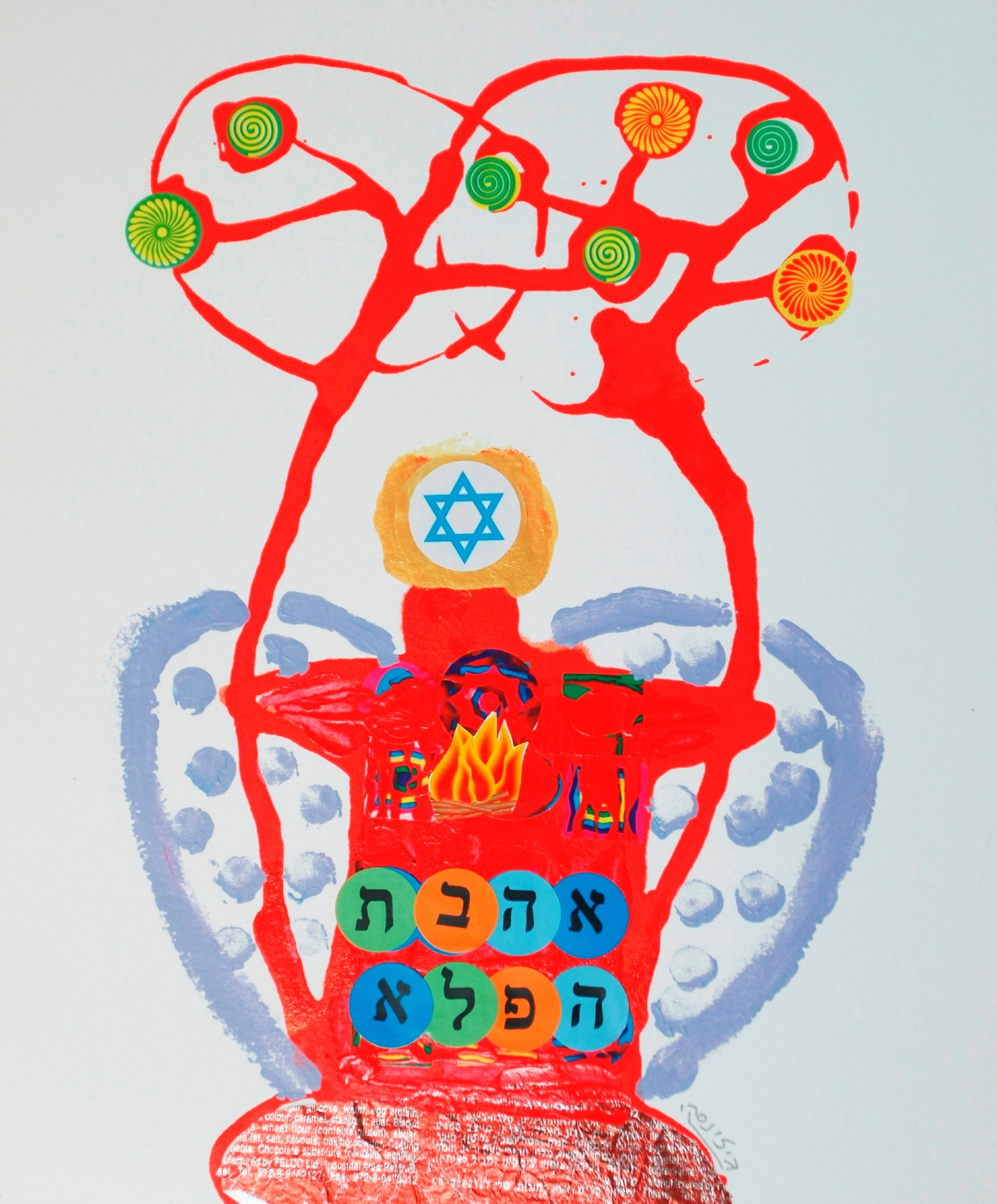 יואל גילינסקי הוא הוא צייר אמן ומרצה בכיר בבצלאל. ציור אהבת הפלא 2011 צבע שמן תעשייתי על נייר ומדבקות